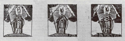 Schluckbildchen für das Vieh mit Abbildung des hl. Erhard. Kupferstich, 8,5 × 3,5 cm